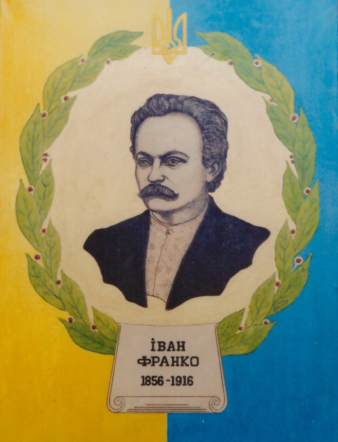 Плакат. Іван Франко. Серія «Літературні пам’ятки України». 1998. Скульптор Таранченко В.О. Папір, туш, гуаш, бронзовий порошок, дерево. 60 х 43 х 2,5.